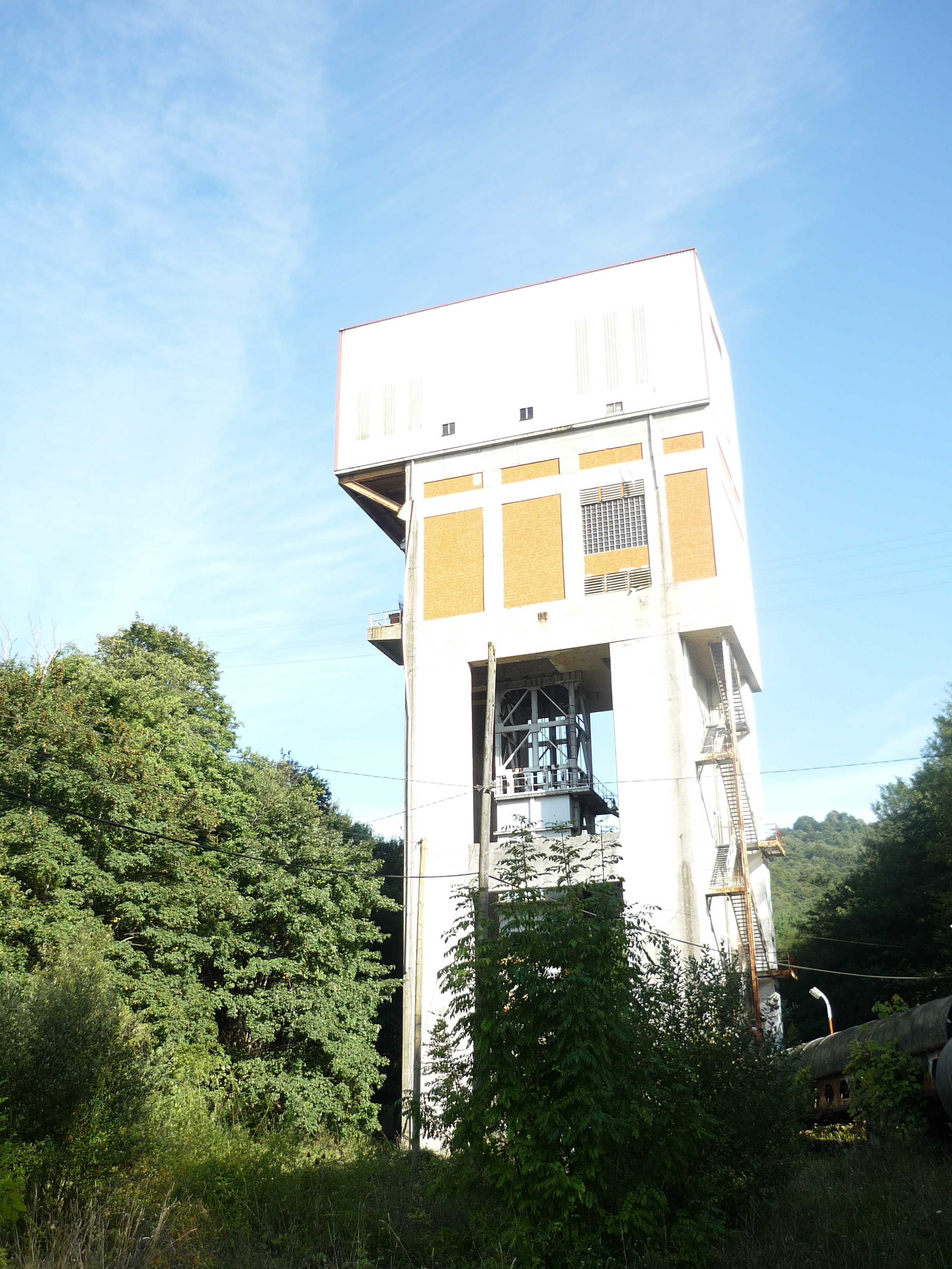 Torre del Pozo Mosquitera de Siero, Asturias, España